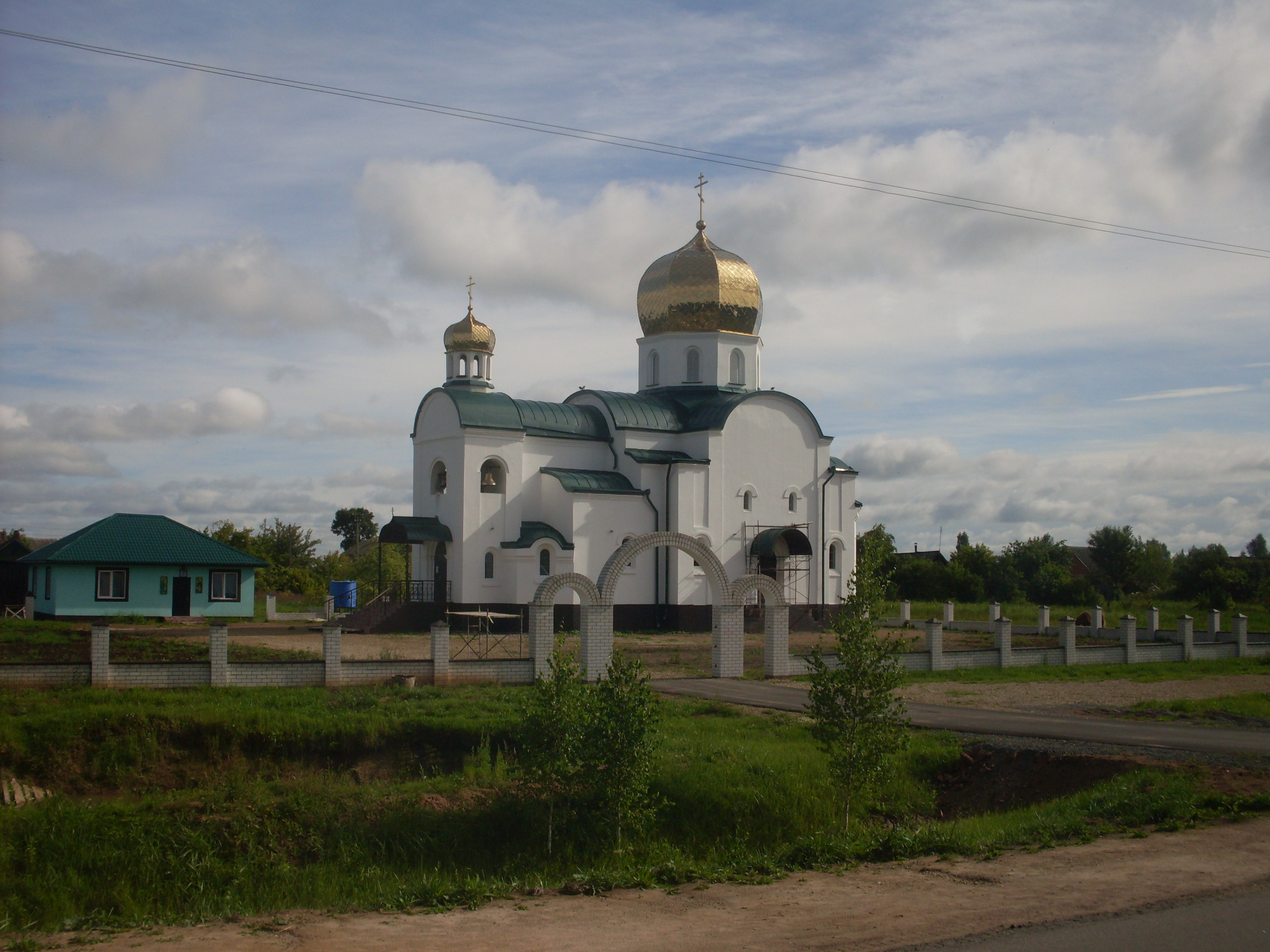 Свято-Онуфриевская православная церковь, Оболь, Витебская область, Республика Беларусь